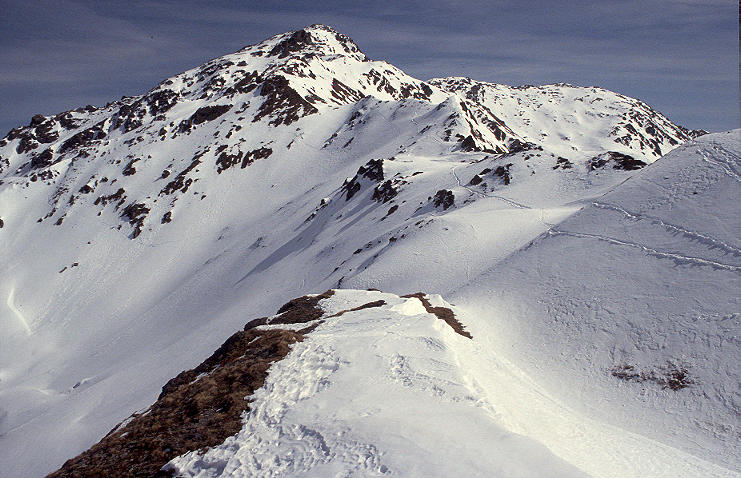 Rastkogel (2762 m), Tuxer Alpen, selbst fotografiert, GNU-FDL